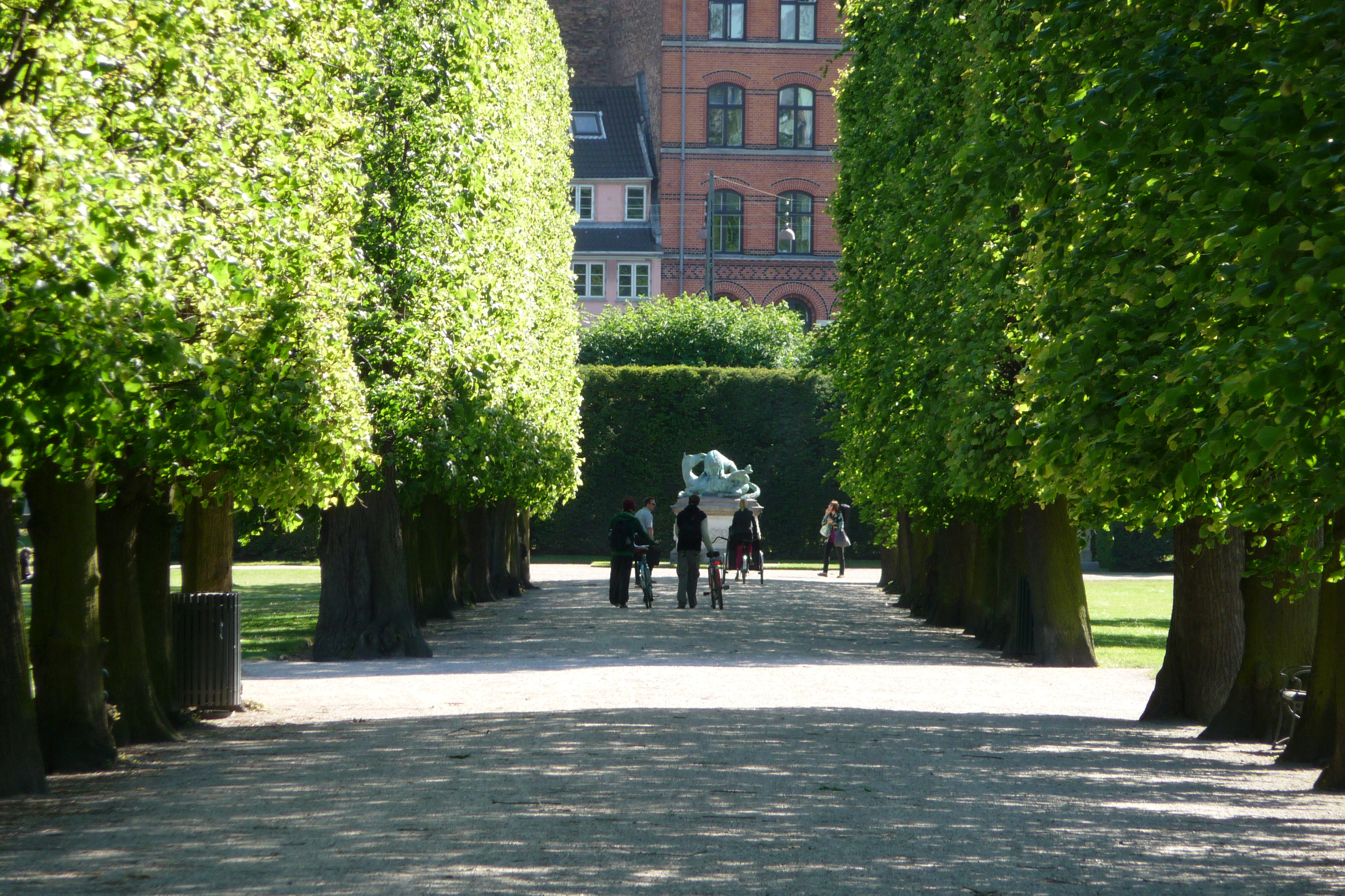 A tree-lined path in Rosenborg Castle Garden in Copenhagen, Denmark